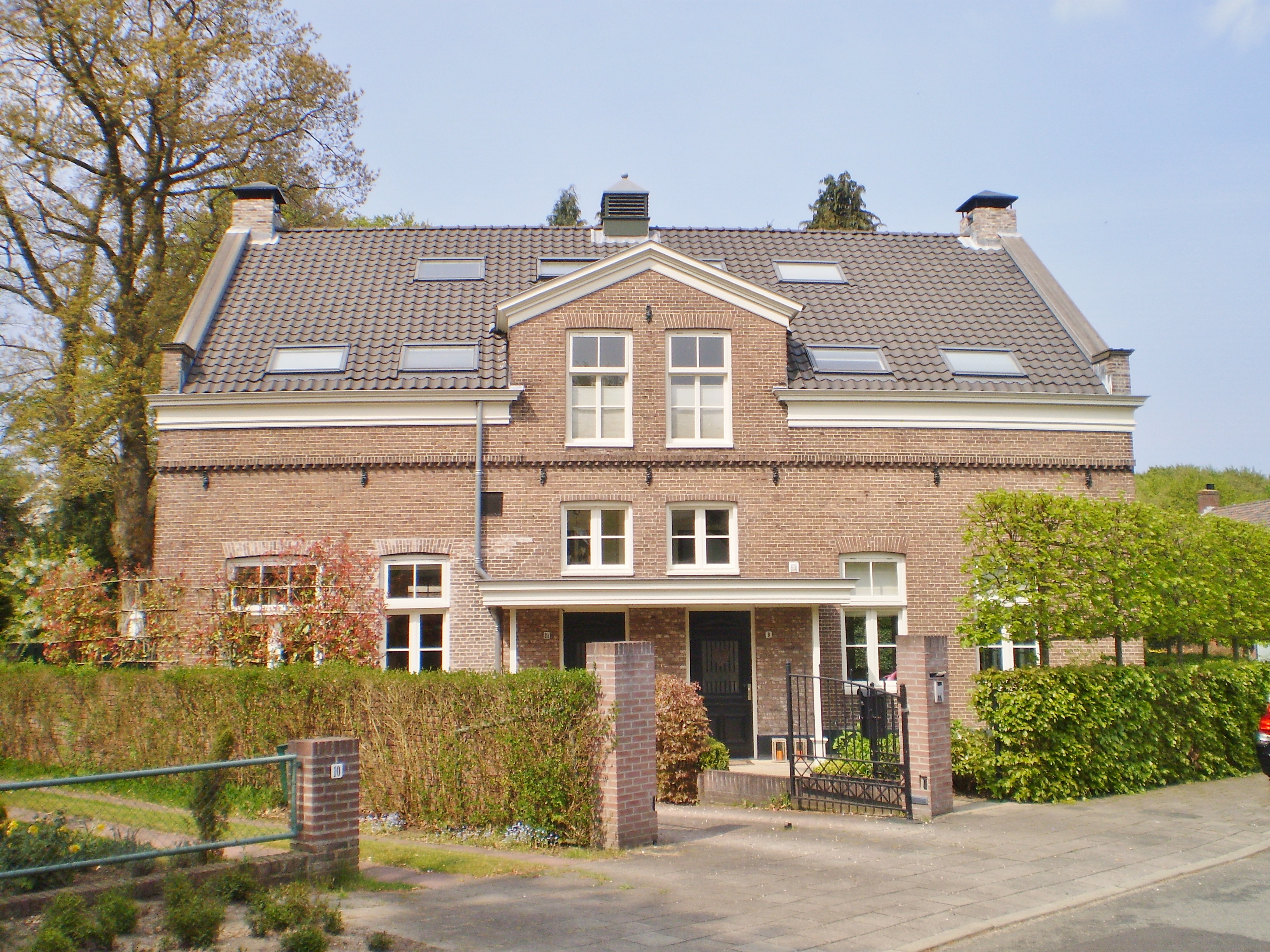 Aan de achtezijde is nog het koetshuis